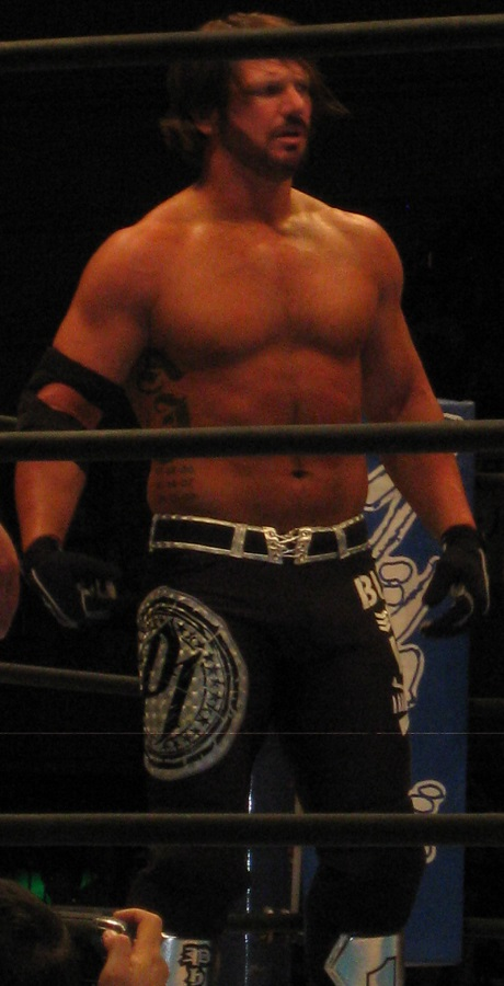 2014年6月21日 大阪府立体育会館 「DOMINION6.21」 AJスタイルズ